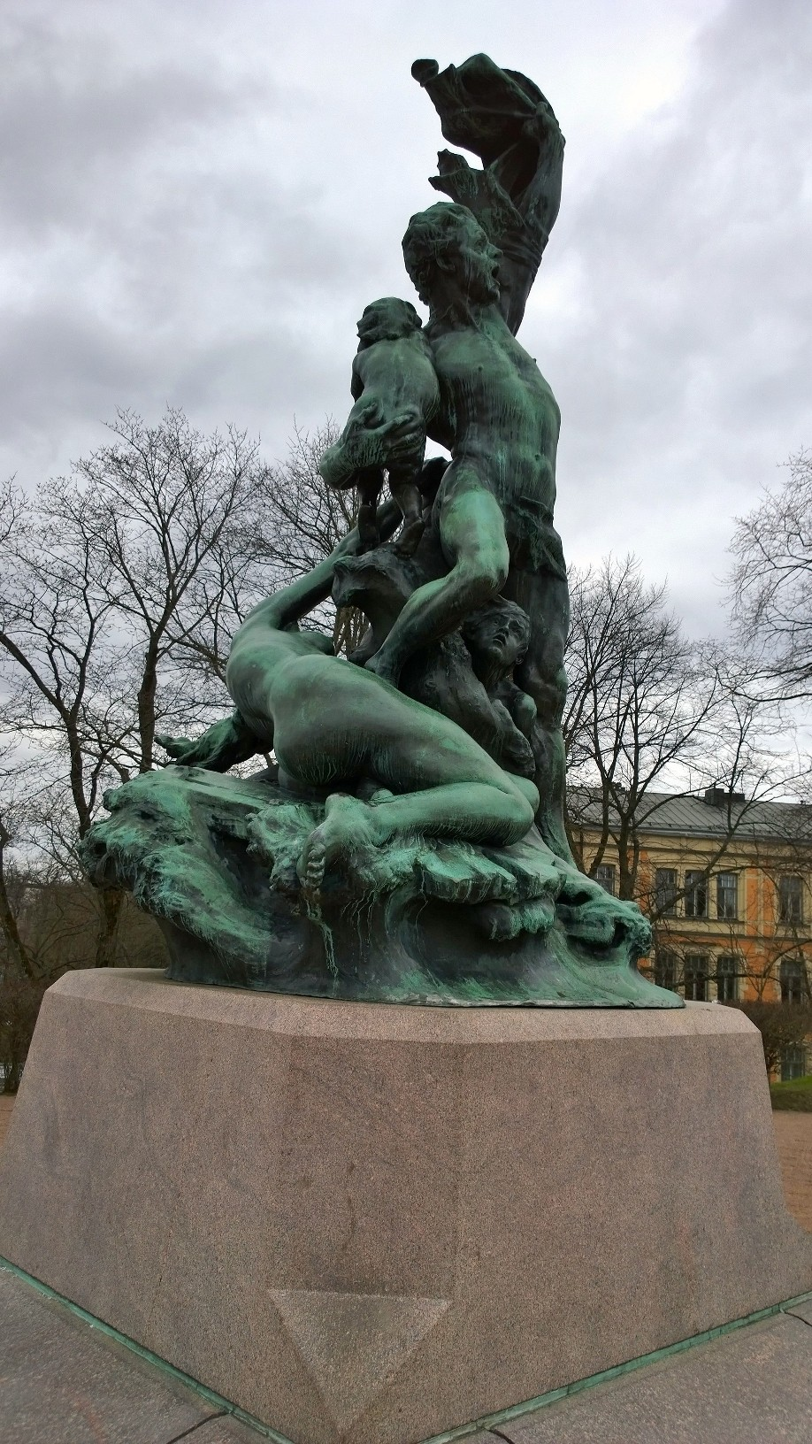 Robert Stigellin veistos Haaksirikkoiset, 1989 Helsingin Ullanlinnan Tähtitorninmäellä.